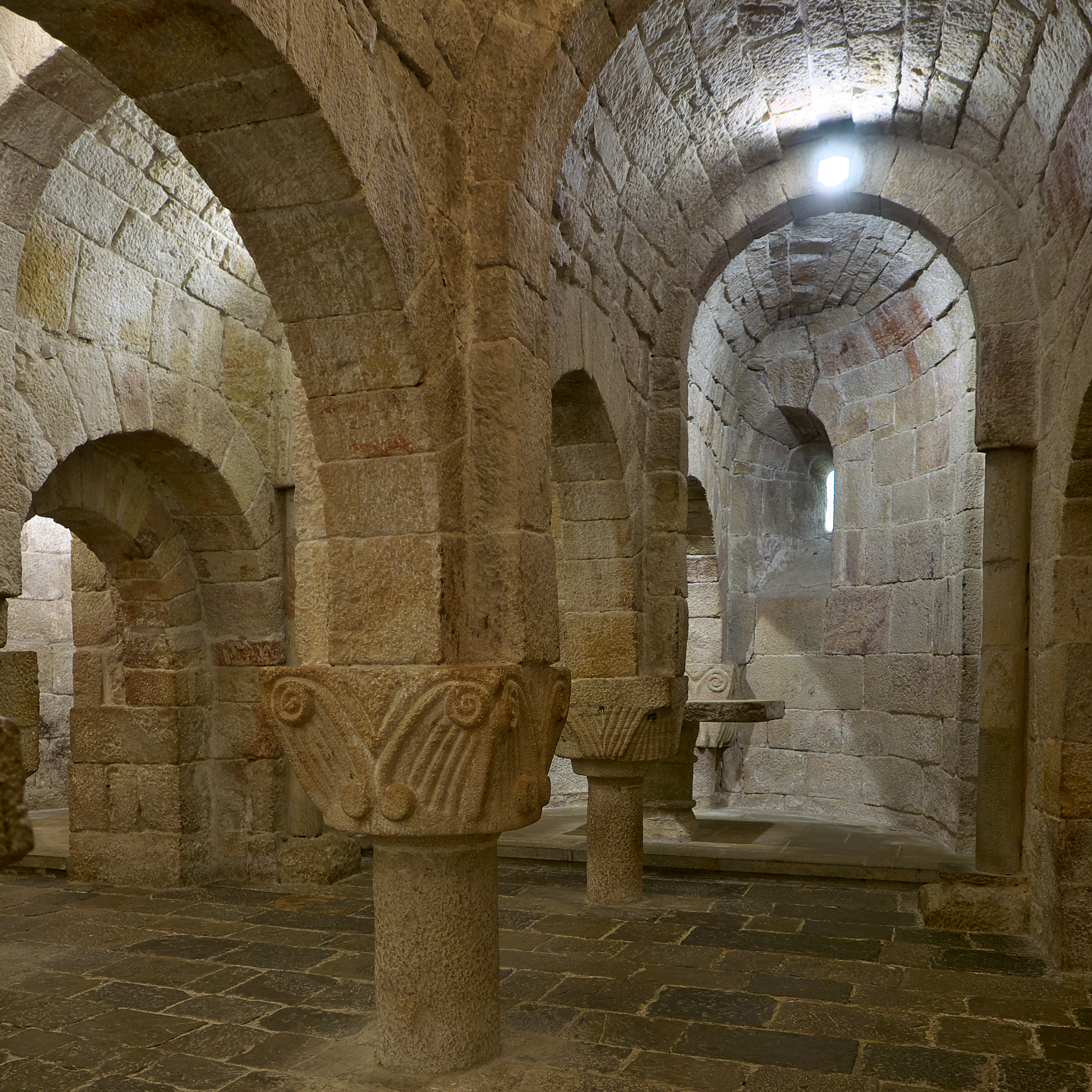 Necesariamente proyectada para nivelar el terreno.